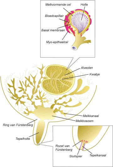 doorsnede van een uier kwartier